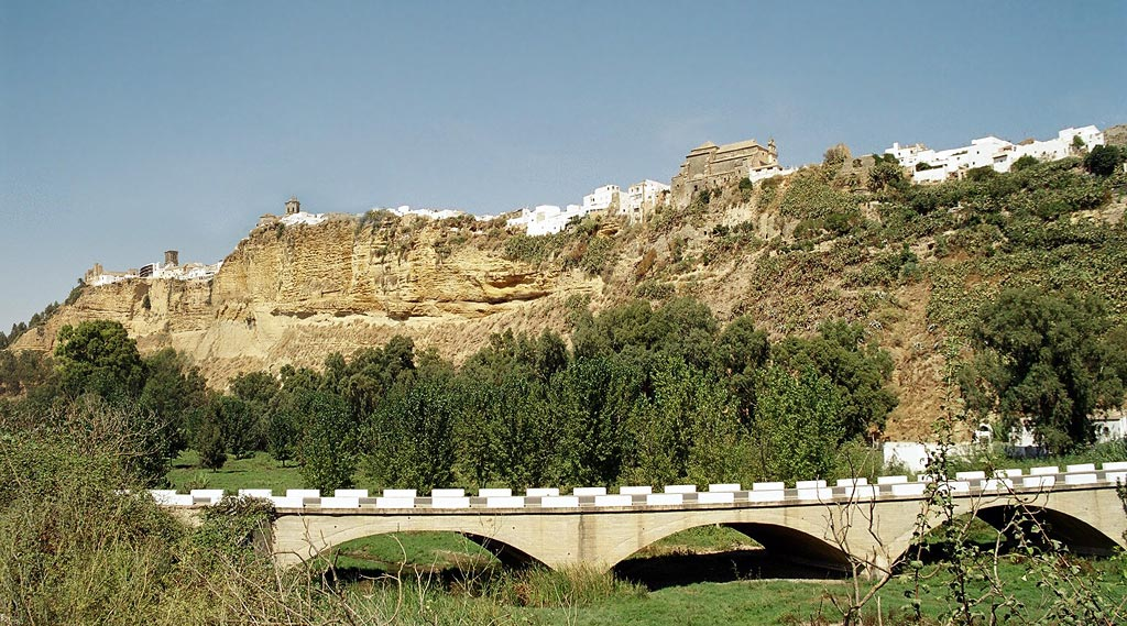 Arcos de la Frontera, 30 km östlich von Jerez de la Frontera in der andalusischen Provinz Cádiz an der Ruta de los Pueblos Blancos ("Straße der weißen Dörfer") gelegene Kleinstadt. Manfred Werner (Benutzer:Tsui), September 2004